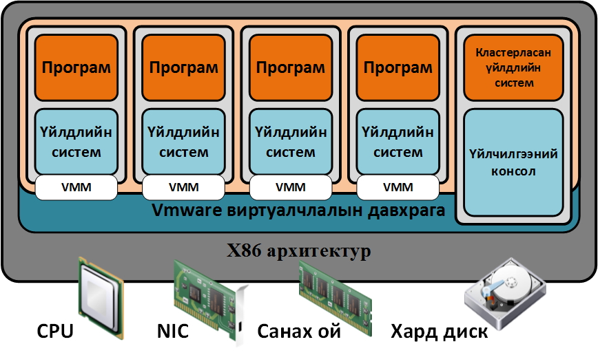 Монгол: Зураг 6 - Bare-metal архитектур